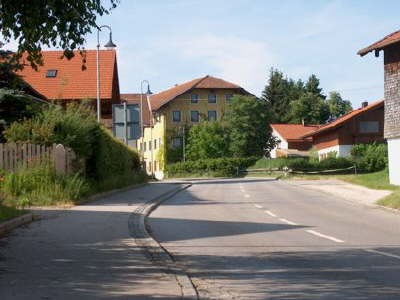 Ortsdurchfahrt Matzing, Oberbayern